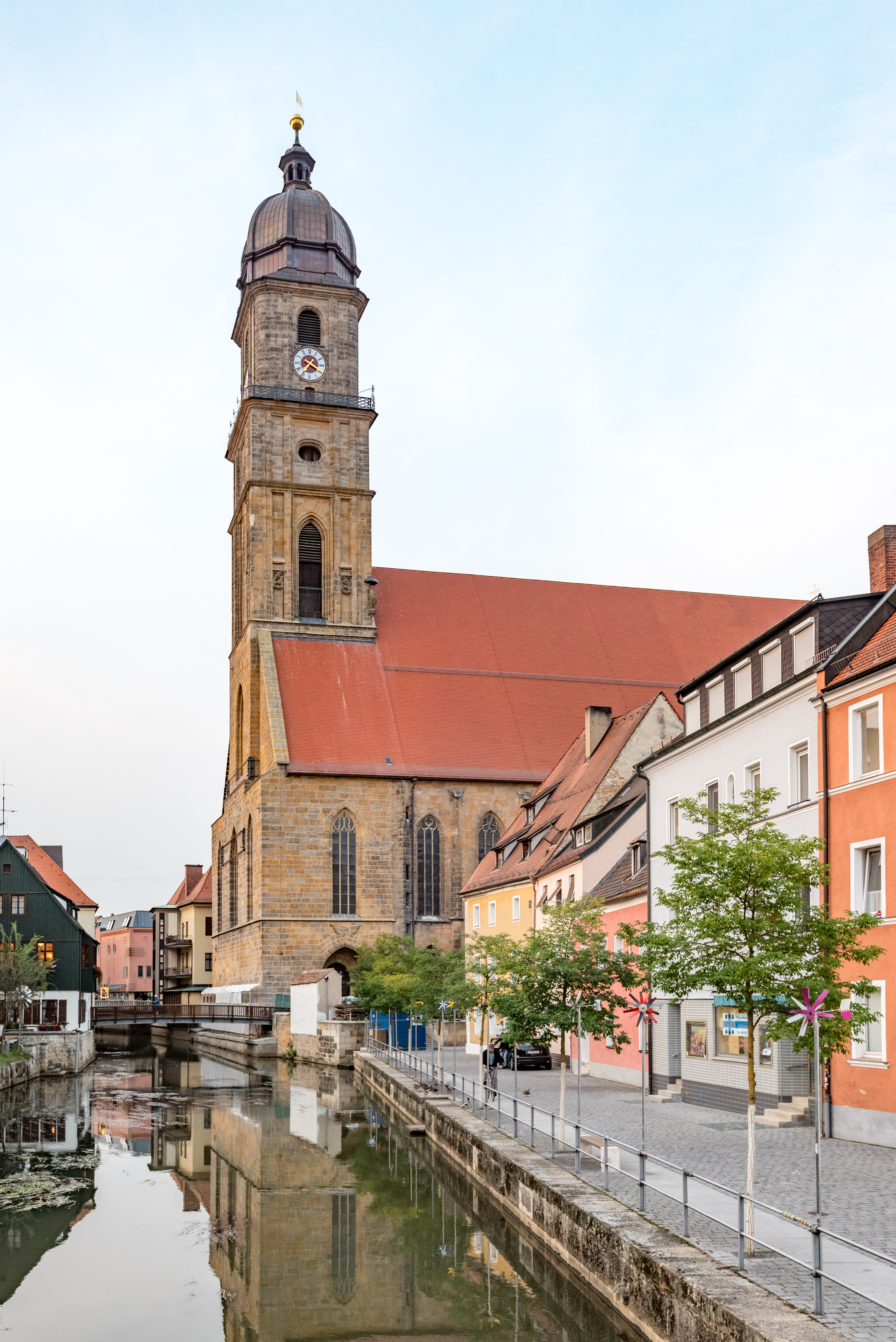 Amberg, Marktplatz 2, Kath. Stadtpfarrkirche St. Martin